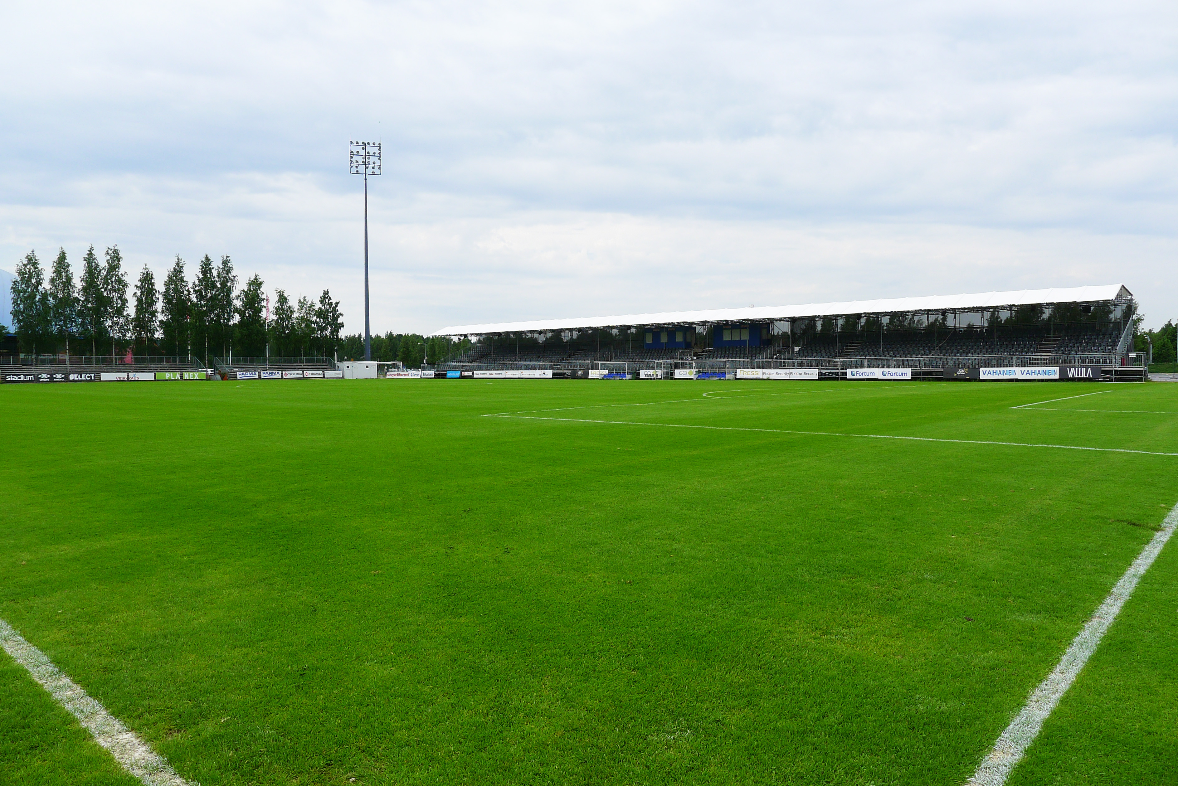 Tapiolan urheilupuisto 7.6.2013